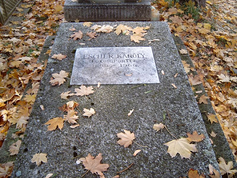 Escher Károly (Szekszárd, 1890. október 22.–Budapest, 1966. február 16.) fotóművész, operatőr, szakíró sírja Budapesten. Farkasréti temető: 7/7-1-109